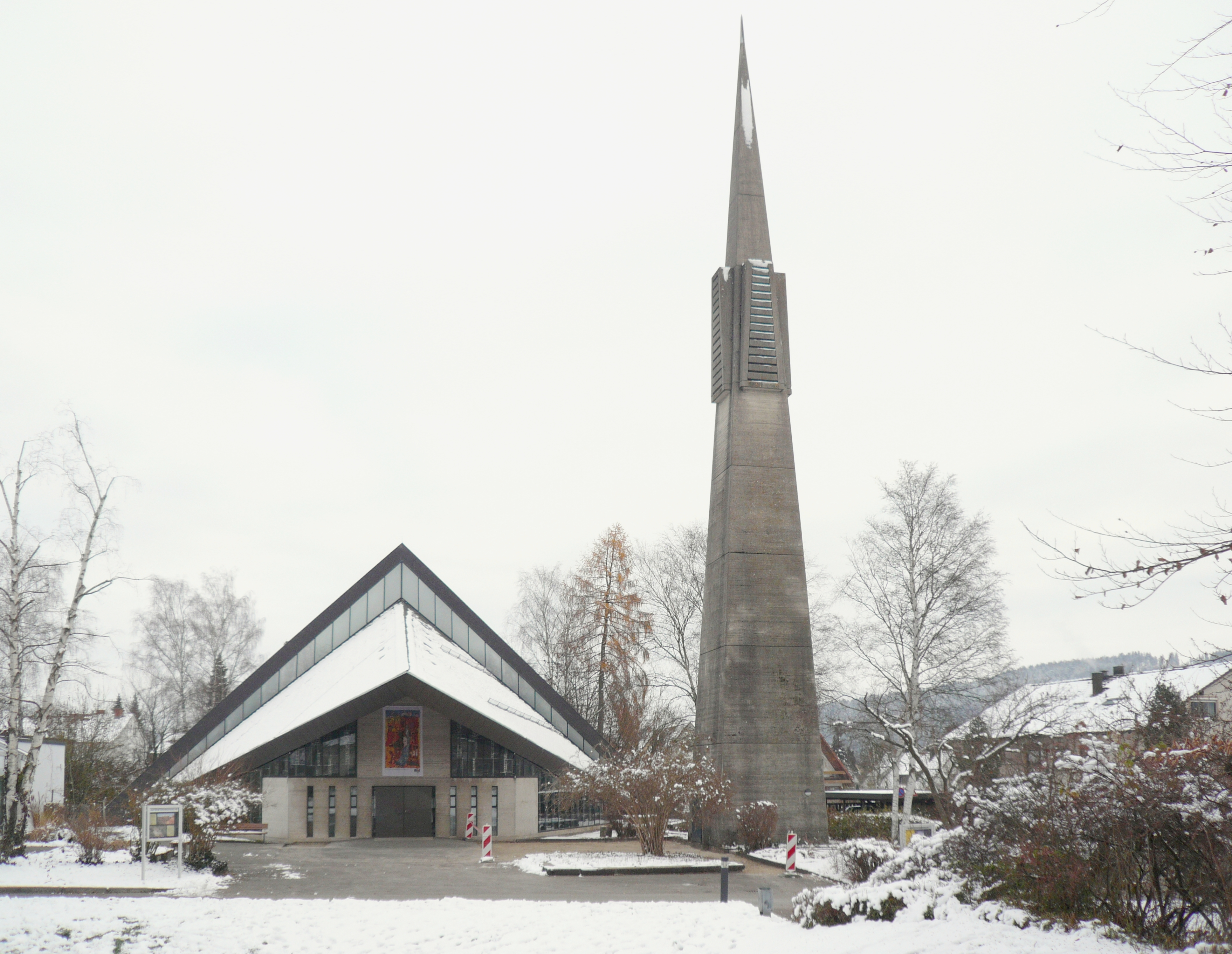 Church Auferstehungskirche in Tuttlingen